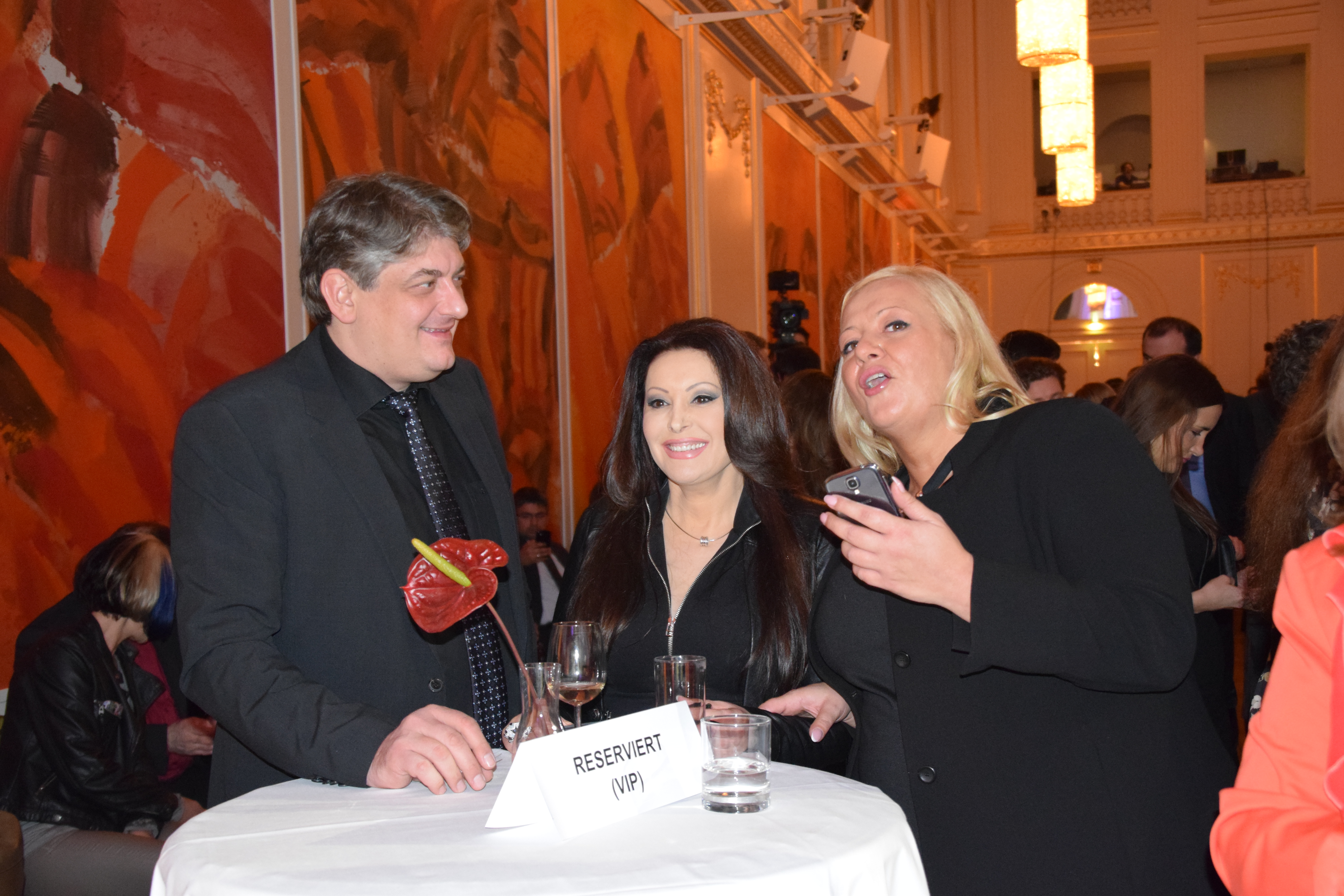 Empfang von Bundesminister Sebastian Kurz gemeinsam mit dem serbischen Premierminister Aleksandar Vučić in der Hofburg. Wien, 29.01.2015